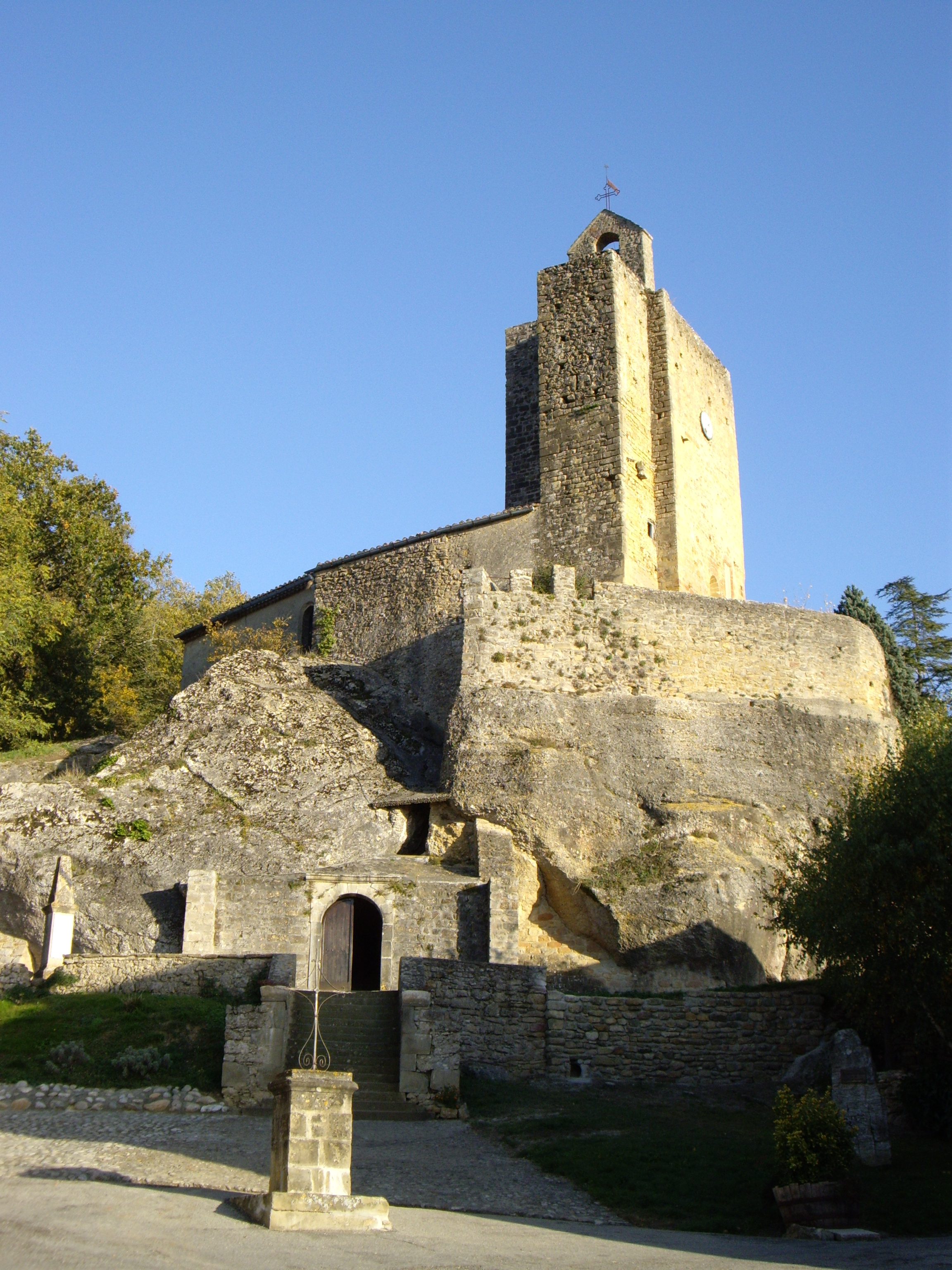 Église Sainte-Marie de Vals